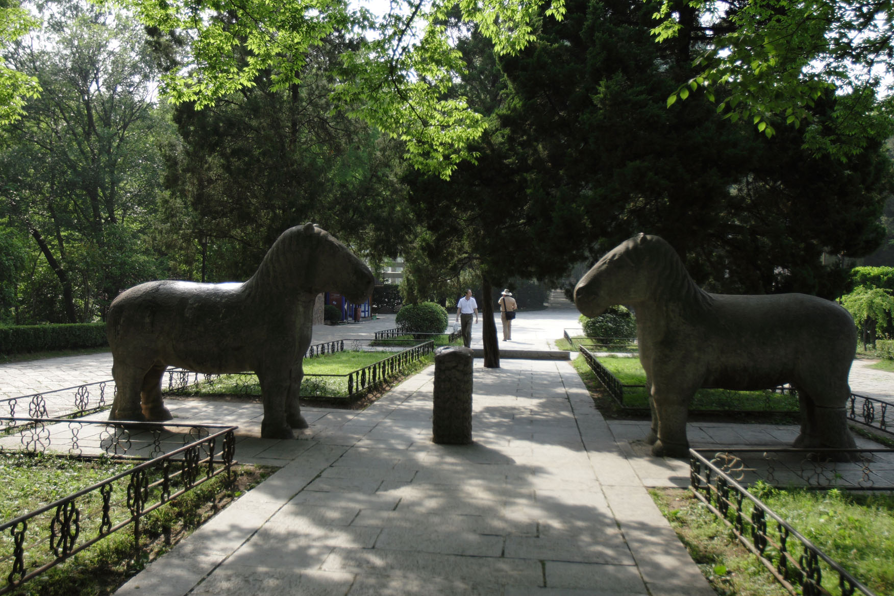 Ming Xiaoling Mausoleum; 明孝陵 at Nanjing